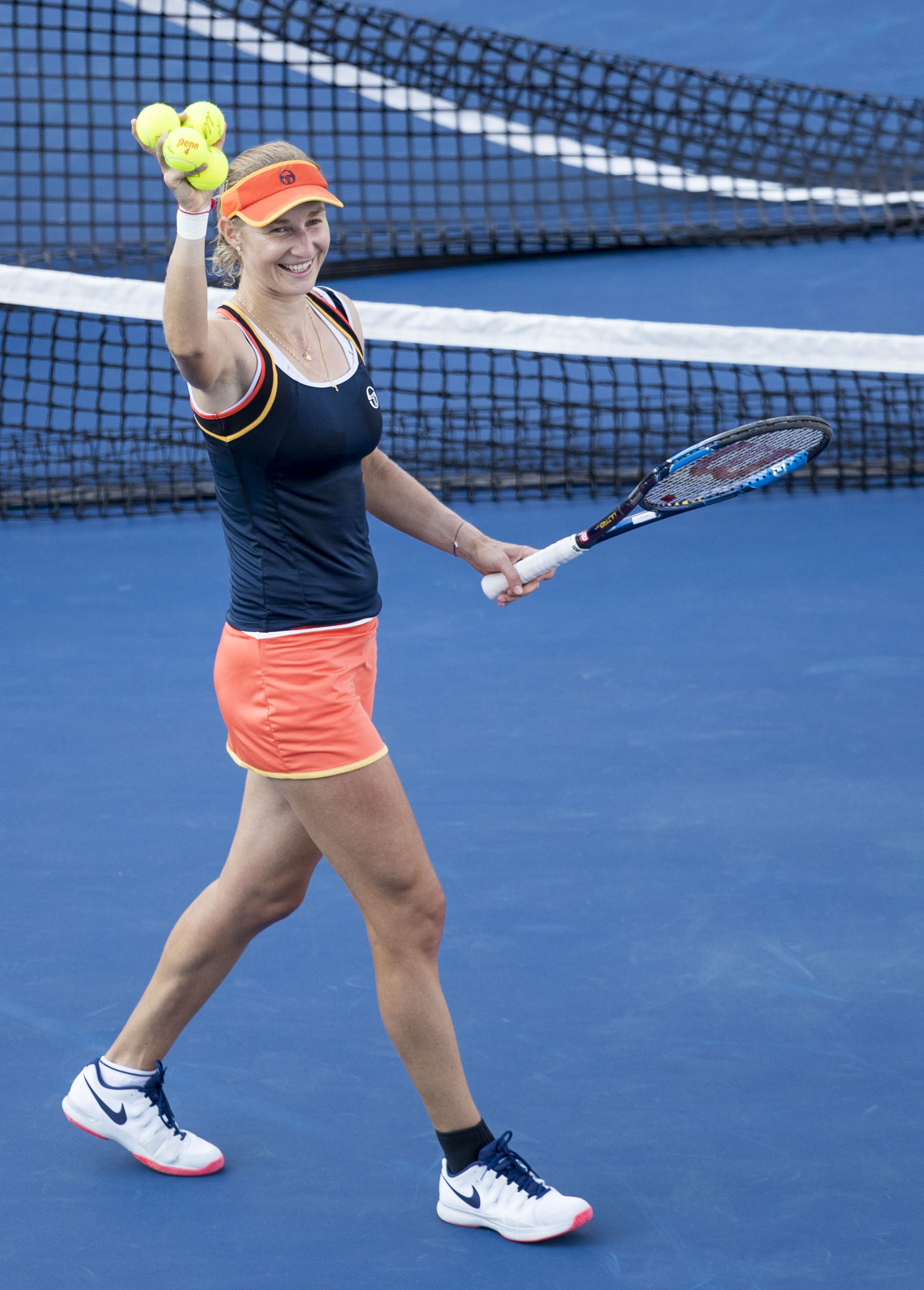 Citi Open Tennis 2017